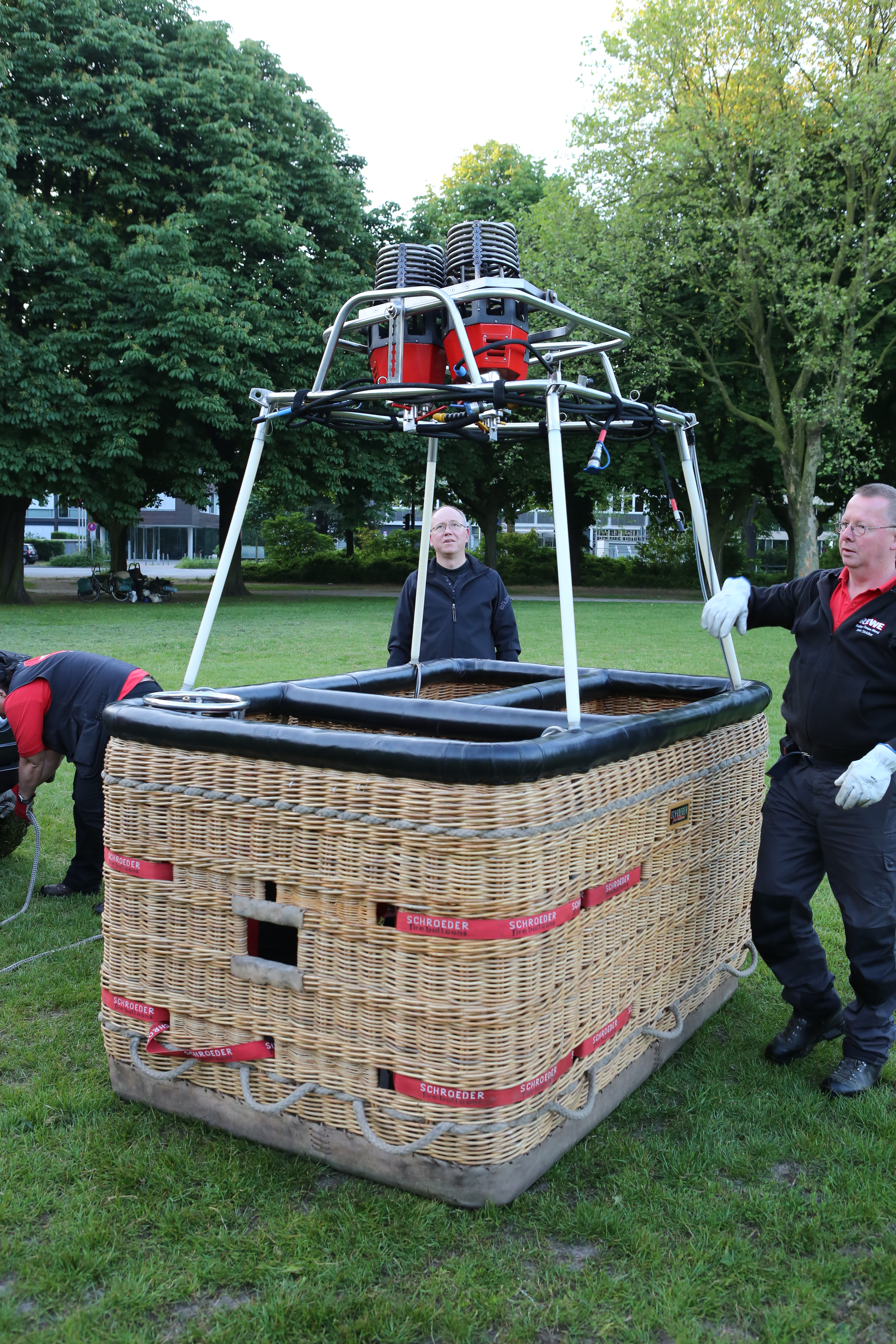 Projekt Heißluftballon, Heißluftballon D-OOST. This photo was taken by Alchemist-hp. If you use one of my photos, an email (account needed) or a message or direct to: my email account would be greatly appreciated. Please note the license terms. Other licensing terms can get discussed, too. This file has been released under a license which is incompatible with Facebook's licensing terms. It is not permitted to upload this file to Facebook.